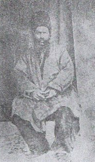 رحمت‌الله خان ساری اصلان حاکم کنگاور و میرشکار ناصرالدین شاه